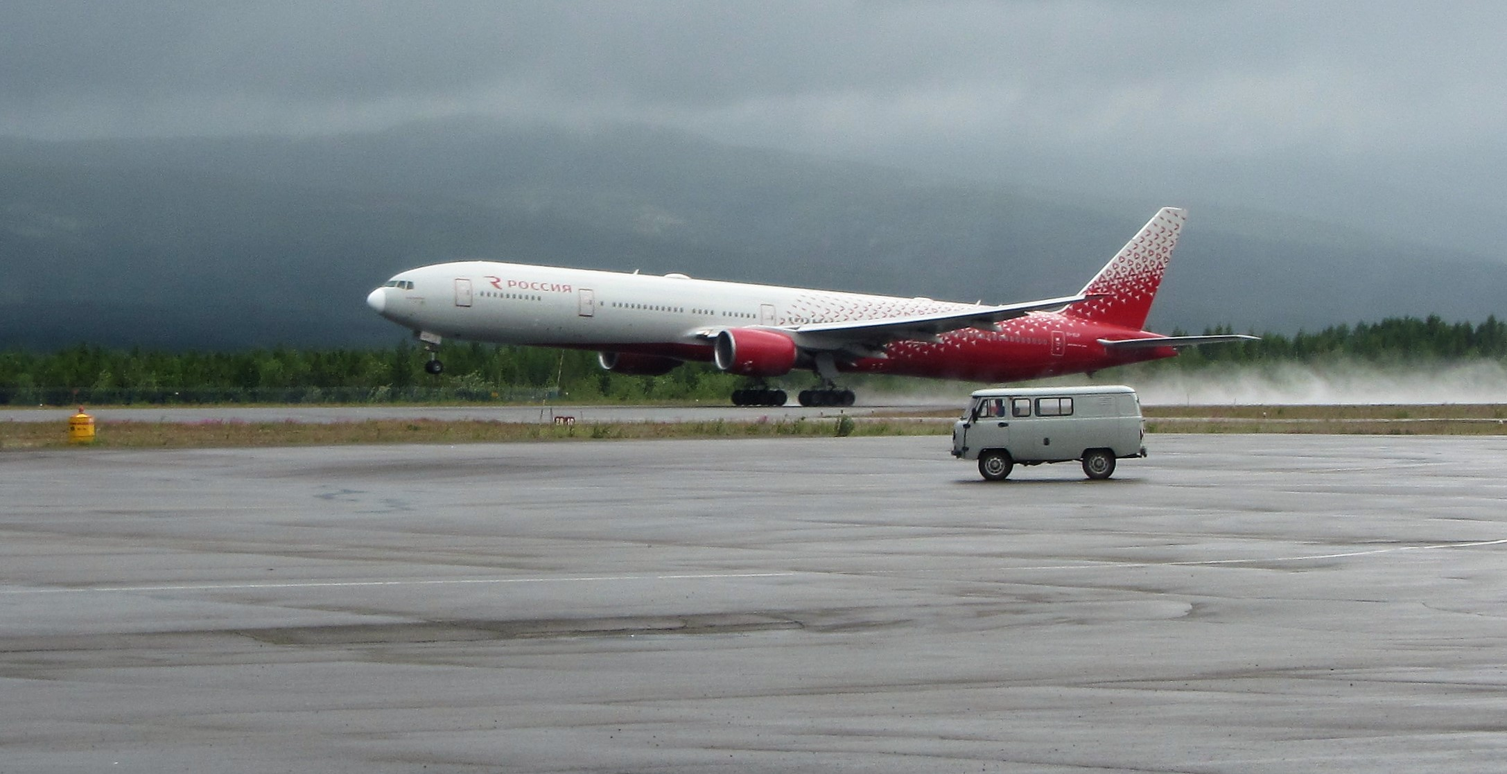 Авиакомпания Россия прибыл в Магадан